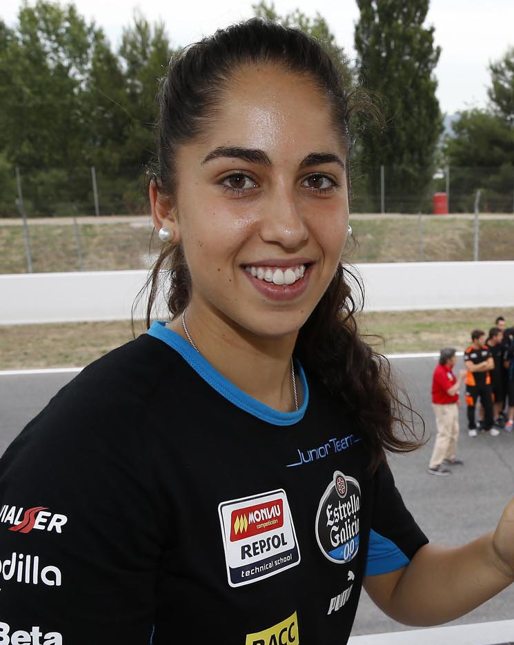 Pulgar arriba de María Herrera en la jornada del Jueves del GP de Montmeló del Mundial de Moto3 de 2014, carrera en la que participó como Wild Card